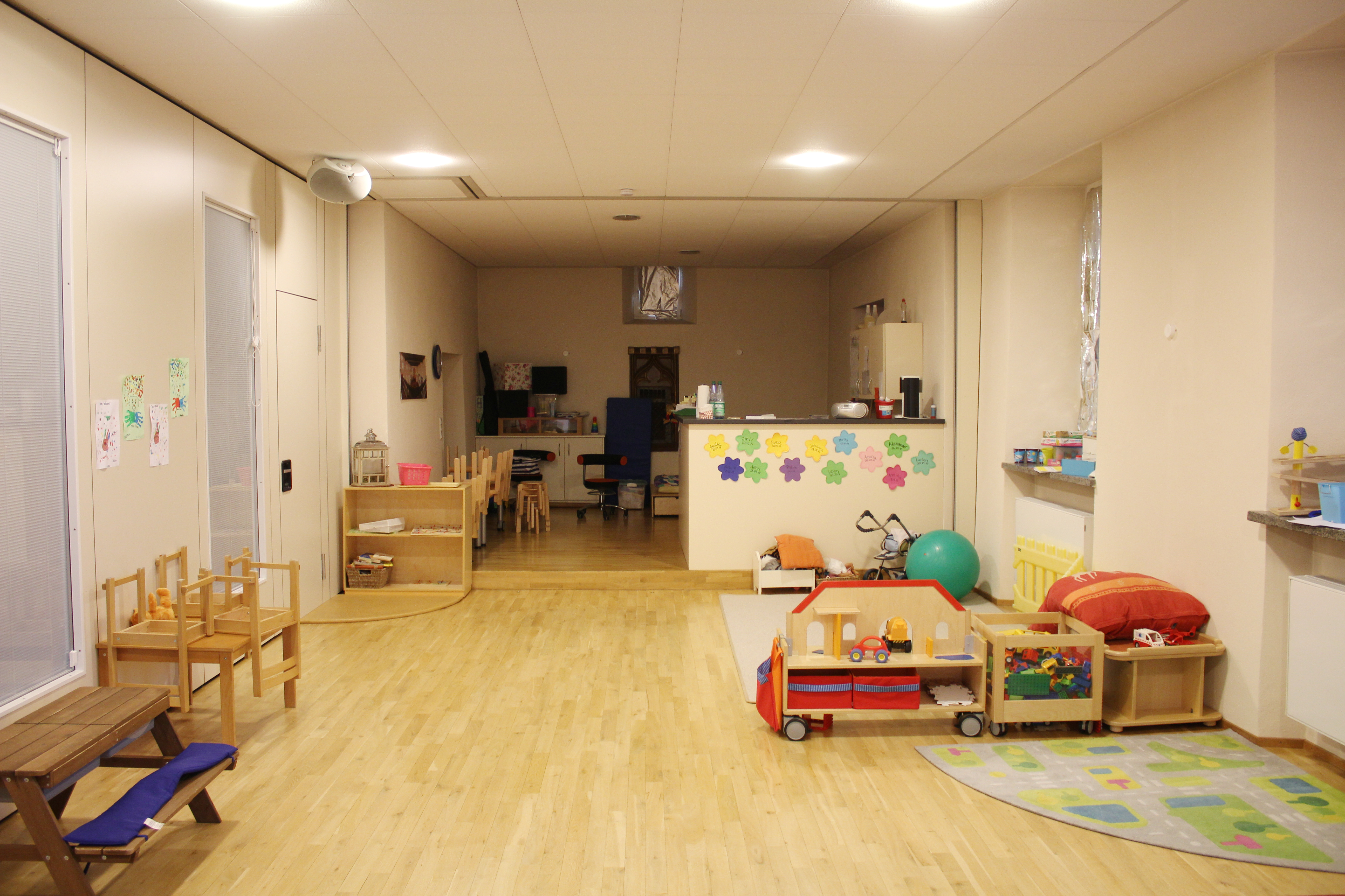 Evangelische Kirche Münchholzhausen, Wetzlar, Lahn-Dill-Kreis, Hessen, Deutschland